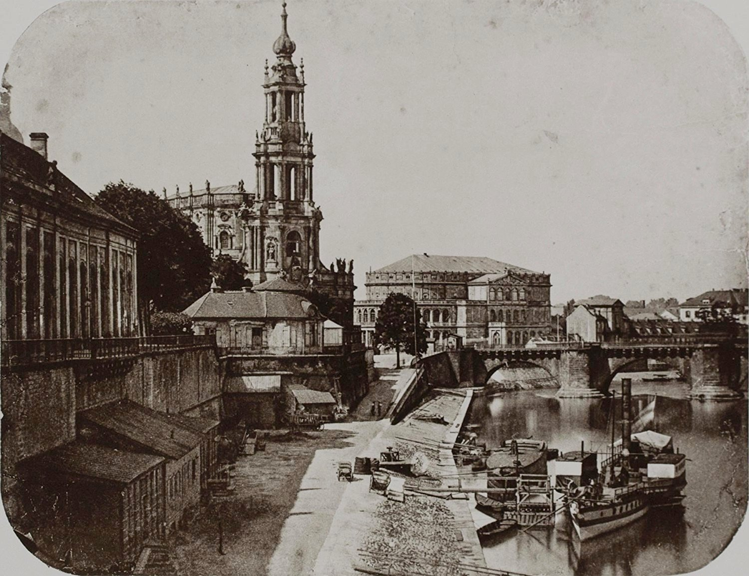 Dresden im 19. Jahrhundert, Blick vom Altstädter Elbufer flussabwärts über die Brühlsche Terrasse und (von links nach rechts): Gartensaal, Katholische Hofkirche, das 1869 abgebrannte Neue Königliche Hoftheater (erste Semperoper), davor die alte Augustusbrücke. Rechts im Bild der Raddampfer Germania.